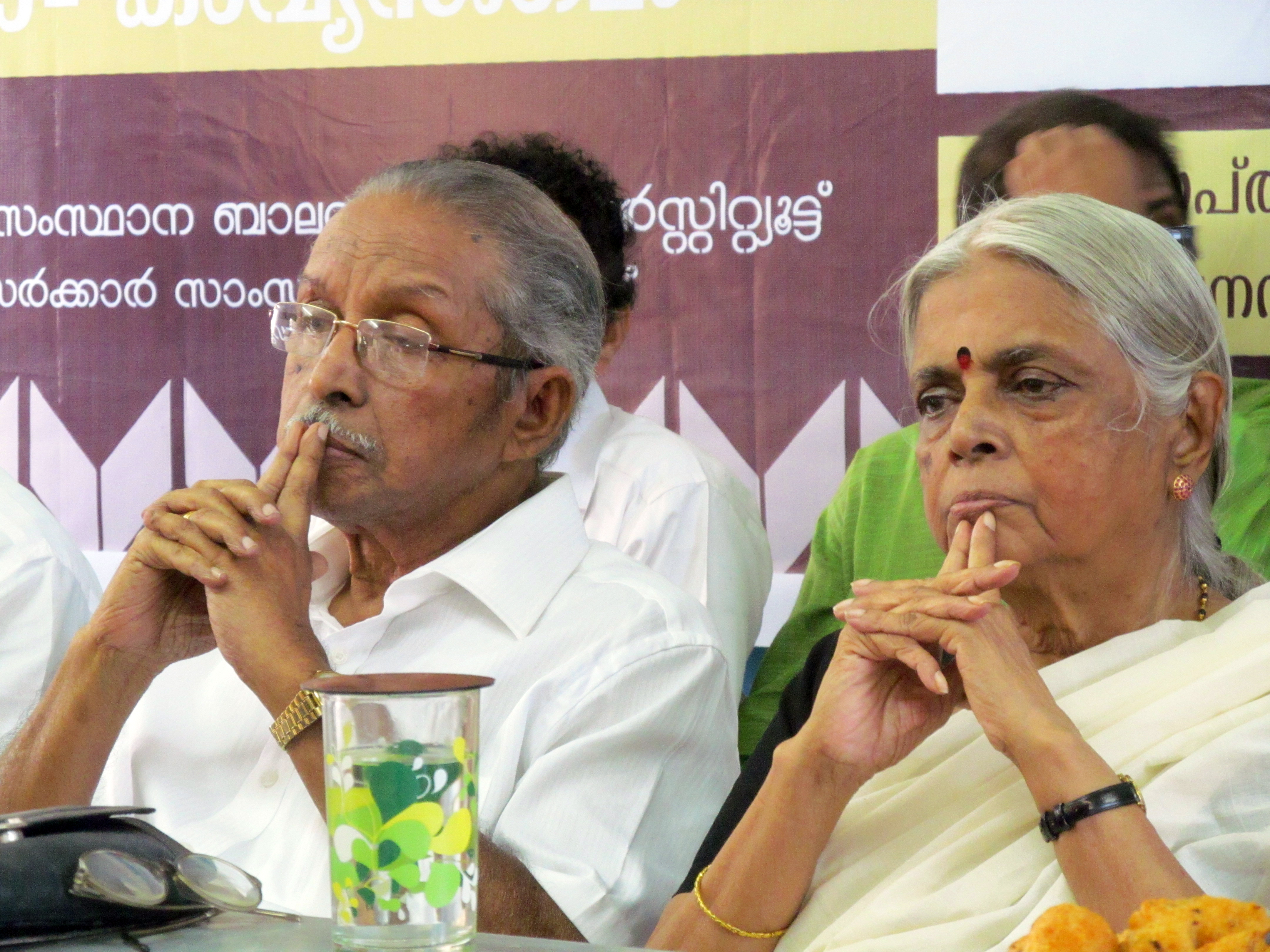 പ്രമുഖ കവികളായ ഒ എൻ വി കുറുപ്പും സുഗതകുമാരിയും ബാലസാഹിത്യ ഇൻസ്റ്റിറ്റ്യൂട്ടിന്റെ ഒരു പരിപാടിയിൽ.